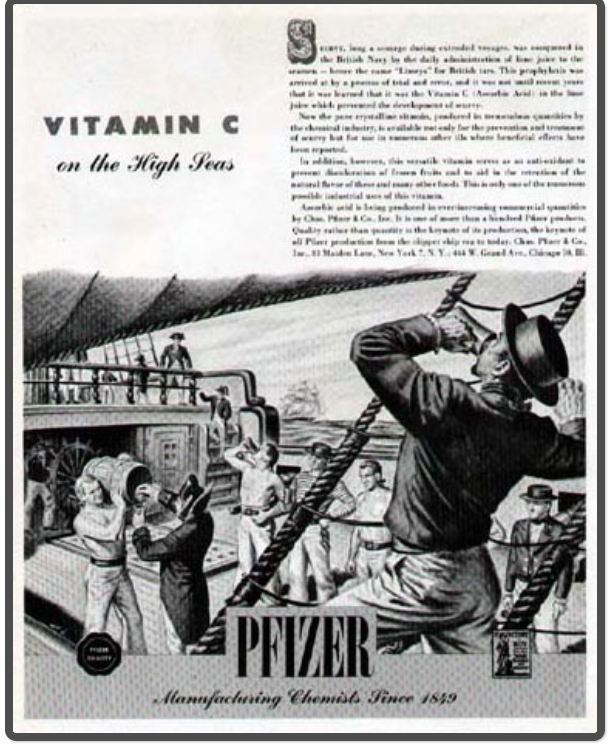 Publicité Pfizer, 1849, pour la vitamine C en mer.